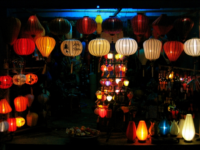 Hoi An lanterns at night.